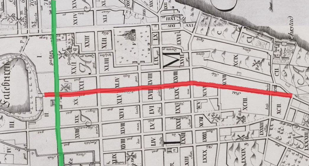 Del av Petrus Tillaeus 1733 års karta över Stockholm. Röd: nuvarande Folkungagatan, grön: Götgatan, norr är uppåt.